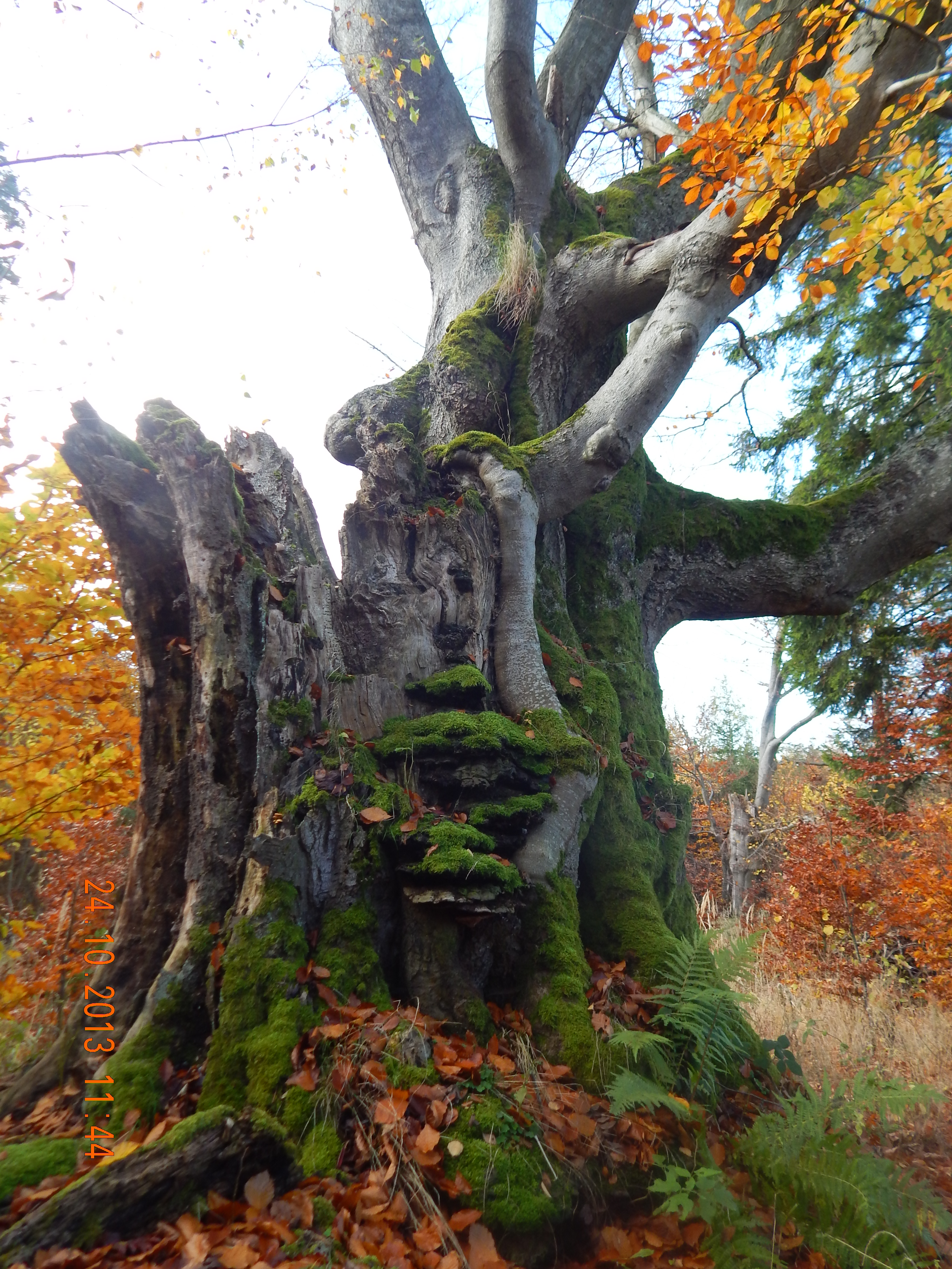 Teslínský buk